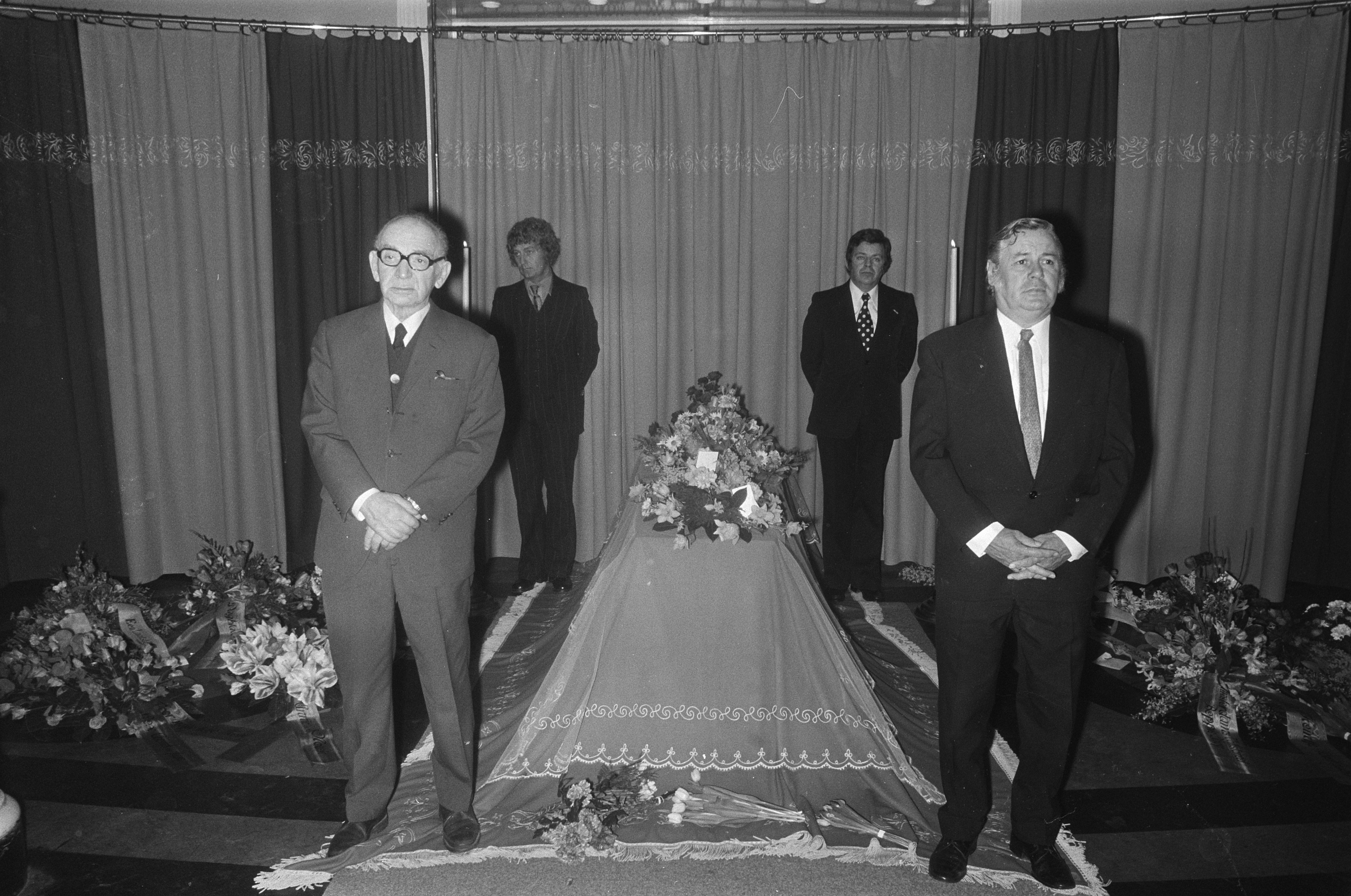 Collectie / Archief : Fotocollectie Anefo Reportage / Serie : [ onbekend ] Beschrijving